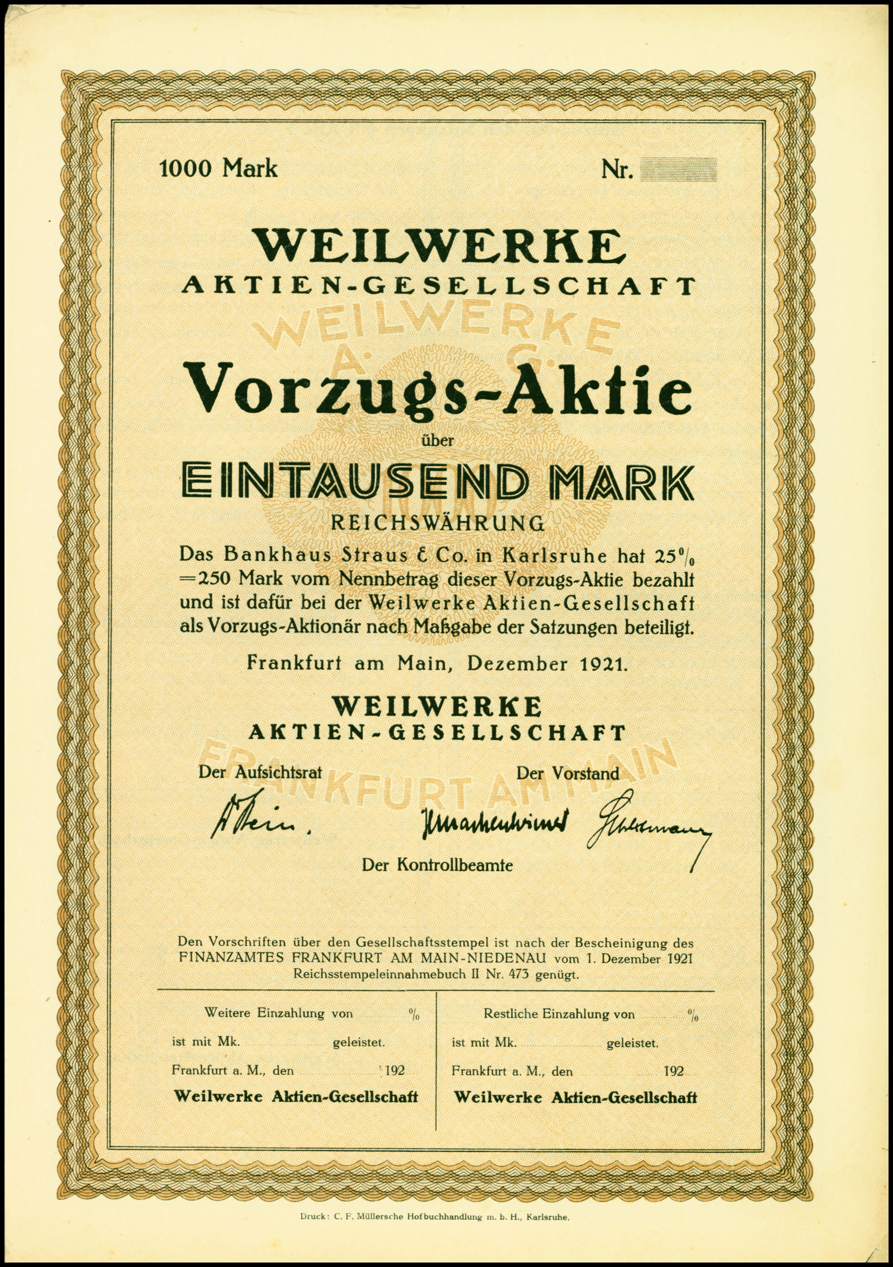 Blankette einer Vorzugsaktie über 1000 Mark vom Dezember 1921 der Weilwerke AG; aus dem Fundus des Ersten Deutschen Historic-Actien-Museum e.V. (EDHAM), Kürnbach